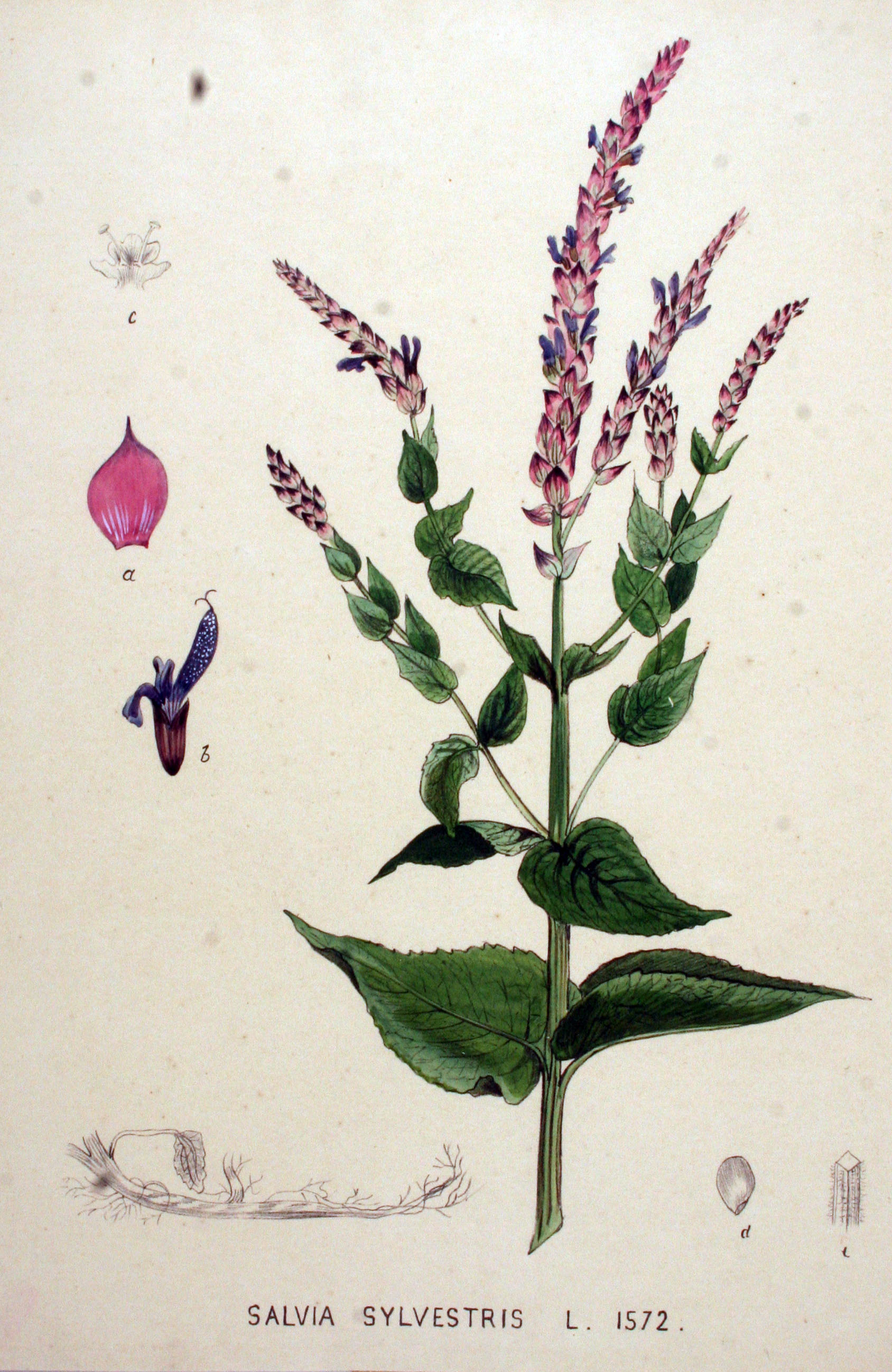 Salvia nemorosa L. (Syn. Salvia sylvestris jacq. non L.)